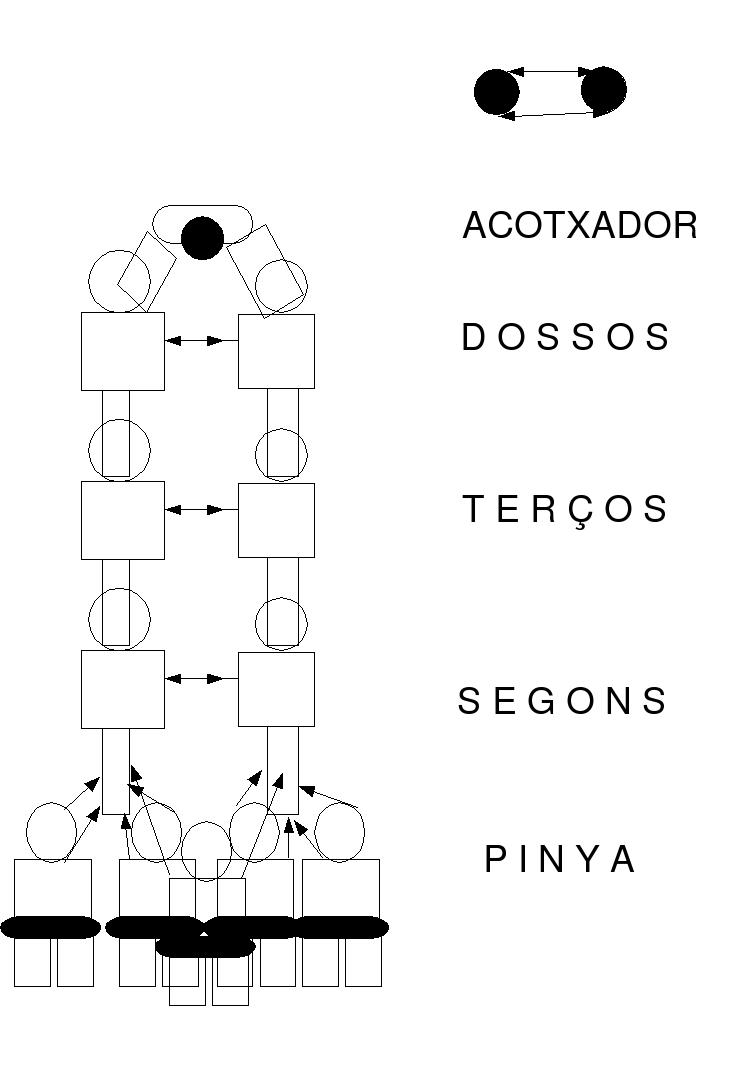 Esquema d'un dos (o torre). Autor : Casteller. Tipus de llicència : .